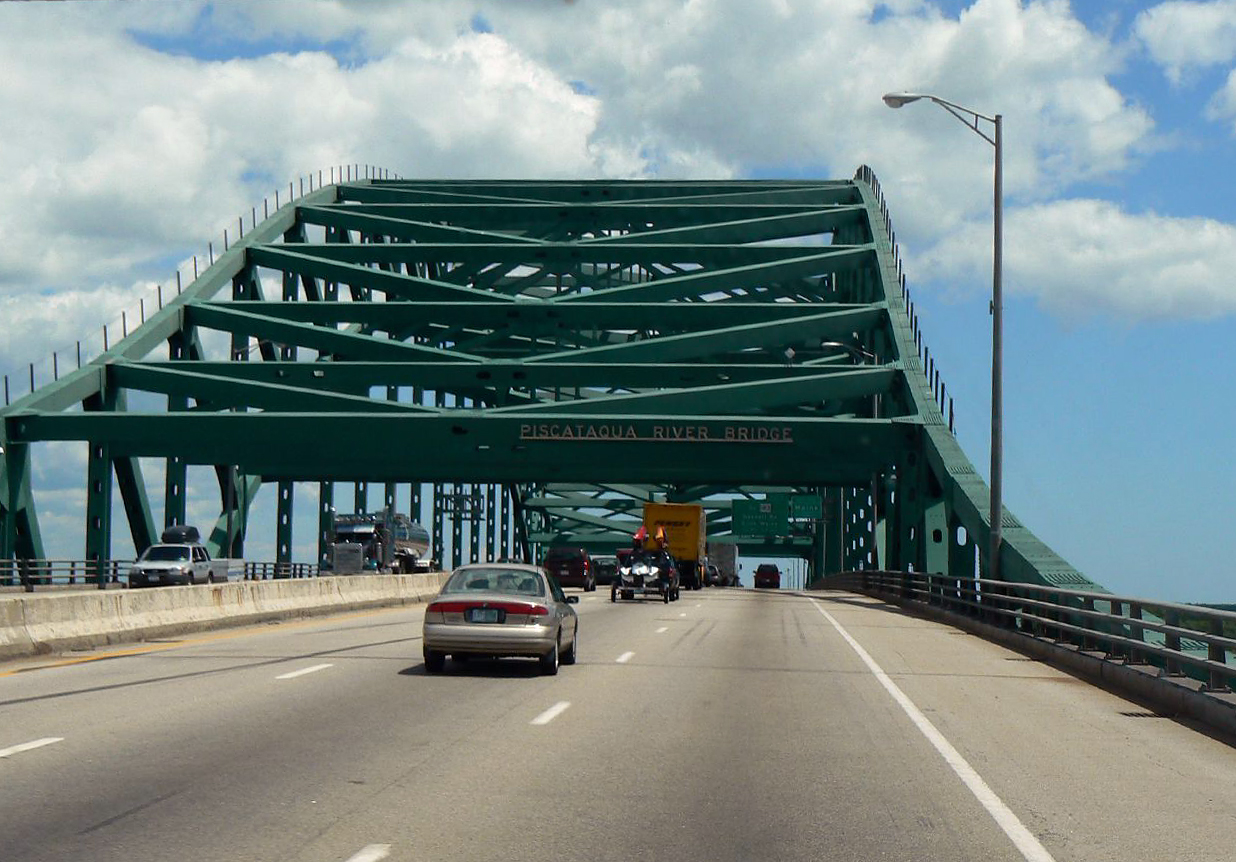 Piscataqua River Bridge